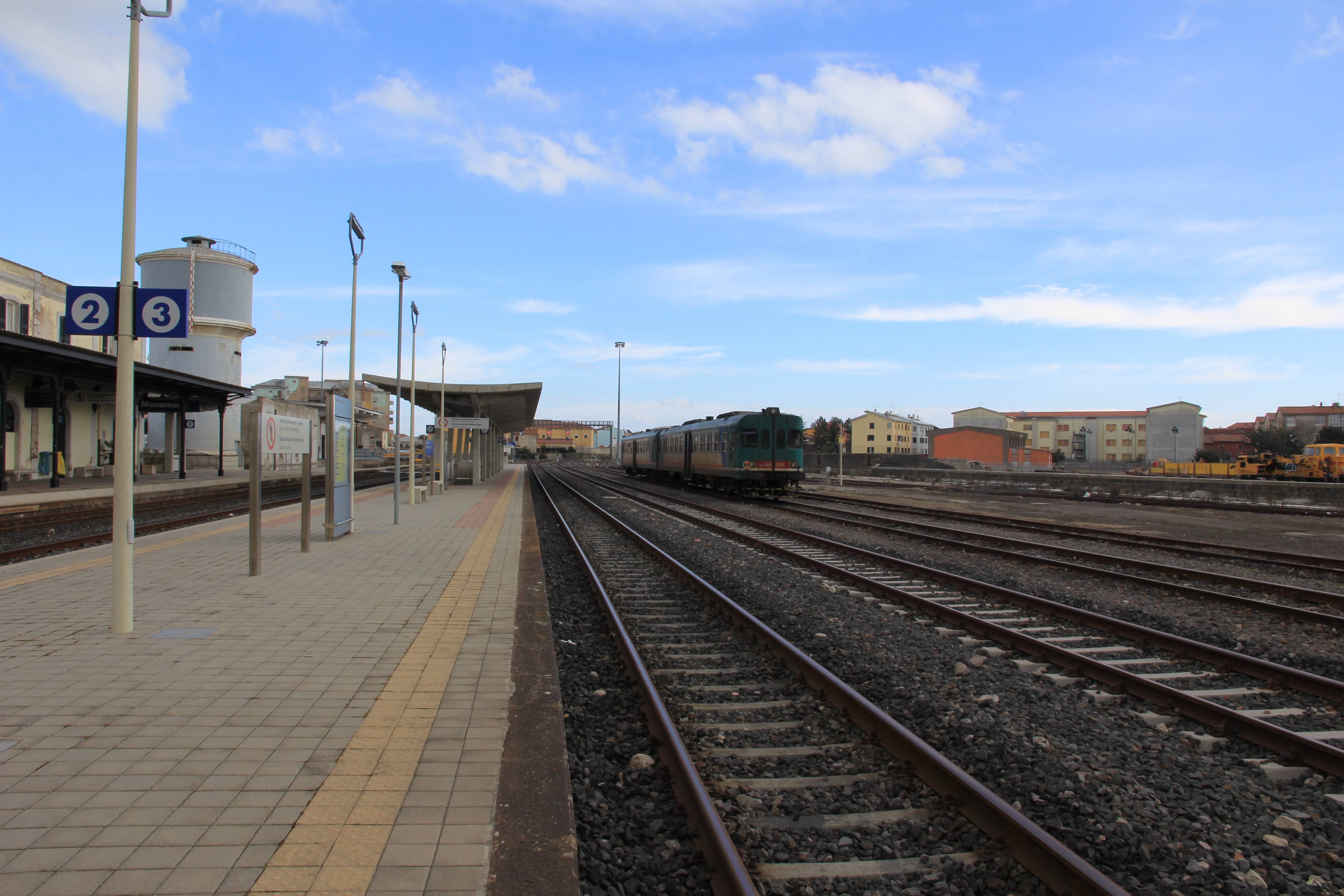 Stazione ferroviaria FS di Macomer